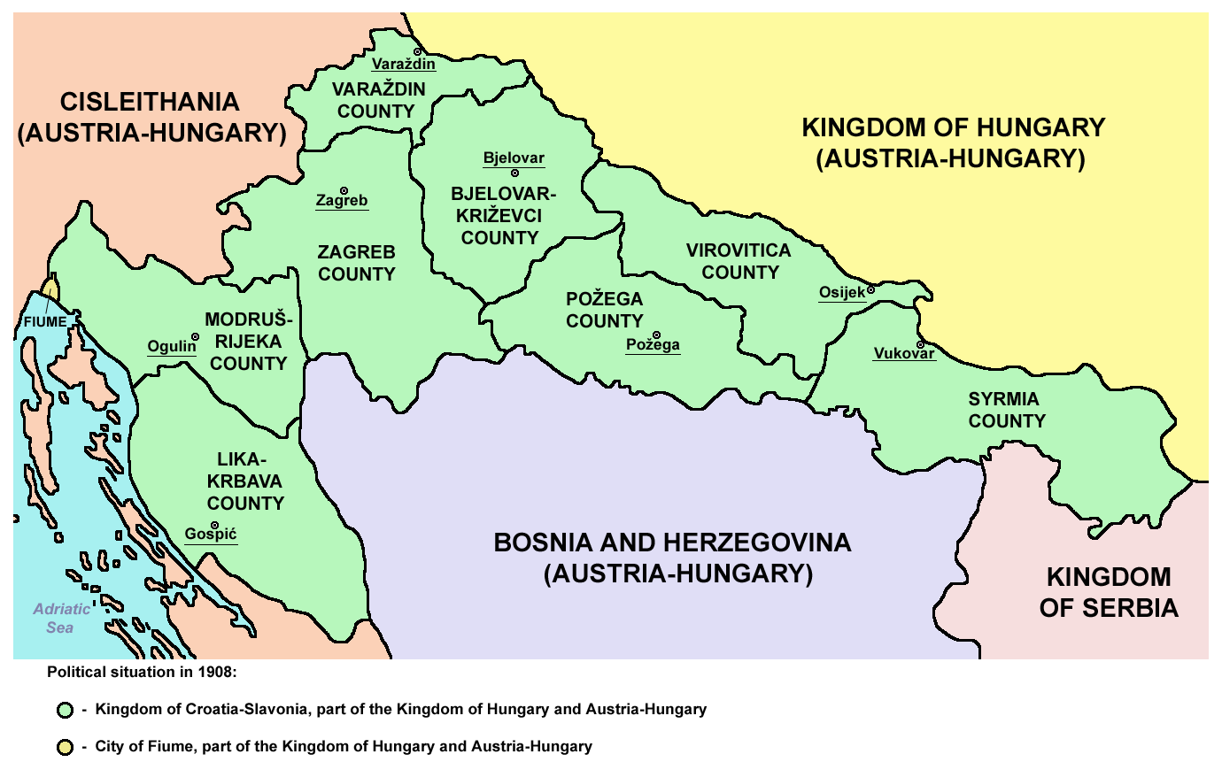 Counties of the Kingdom of Croatia-Slavonia and City of Fiume in 1908.Županije Kraljevine Hrvatske i Slavonije i grad Rijeka 1908. godine.